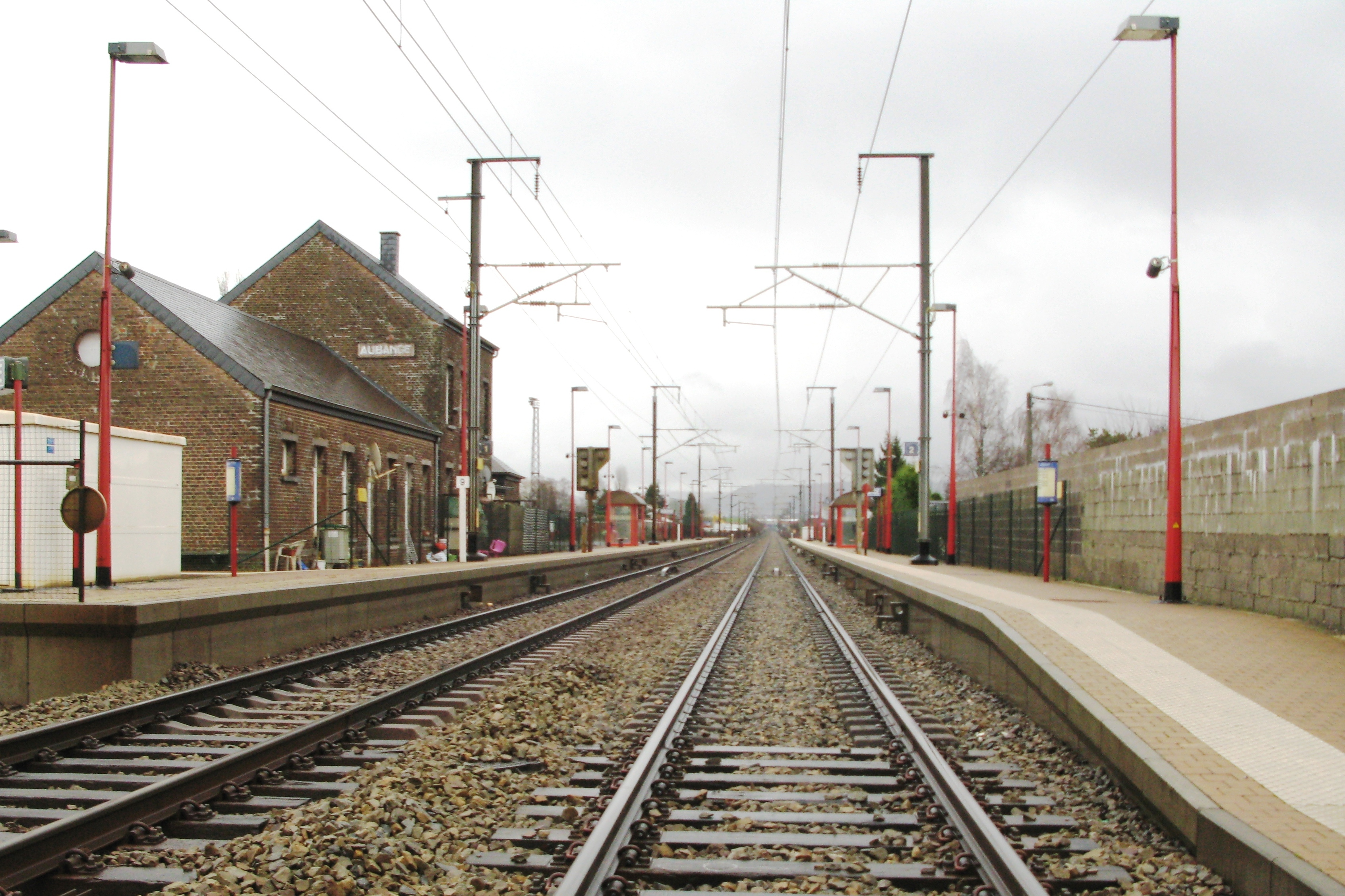 D'Gare vun Éibeng (Belsch).